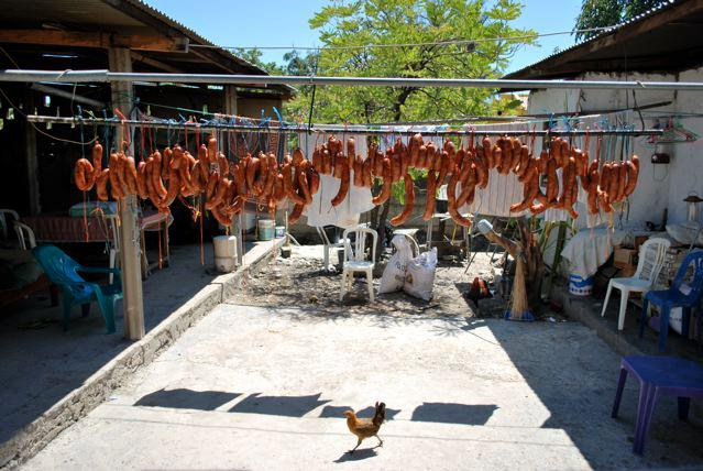 Wurstherstellung in Osttimor